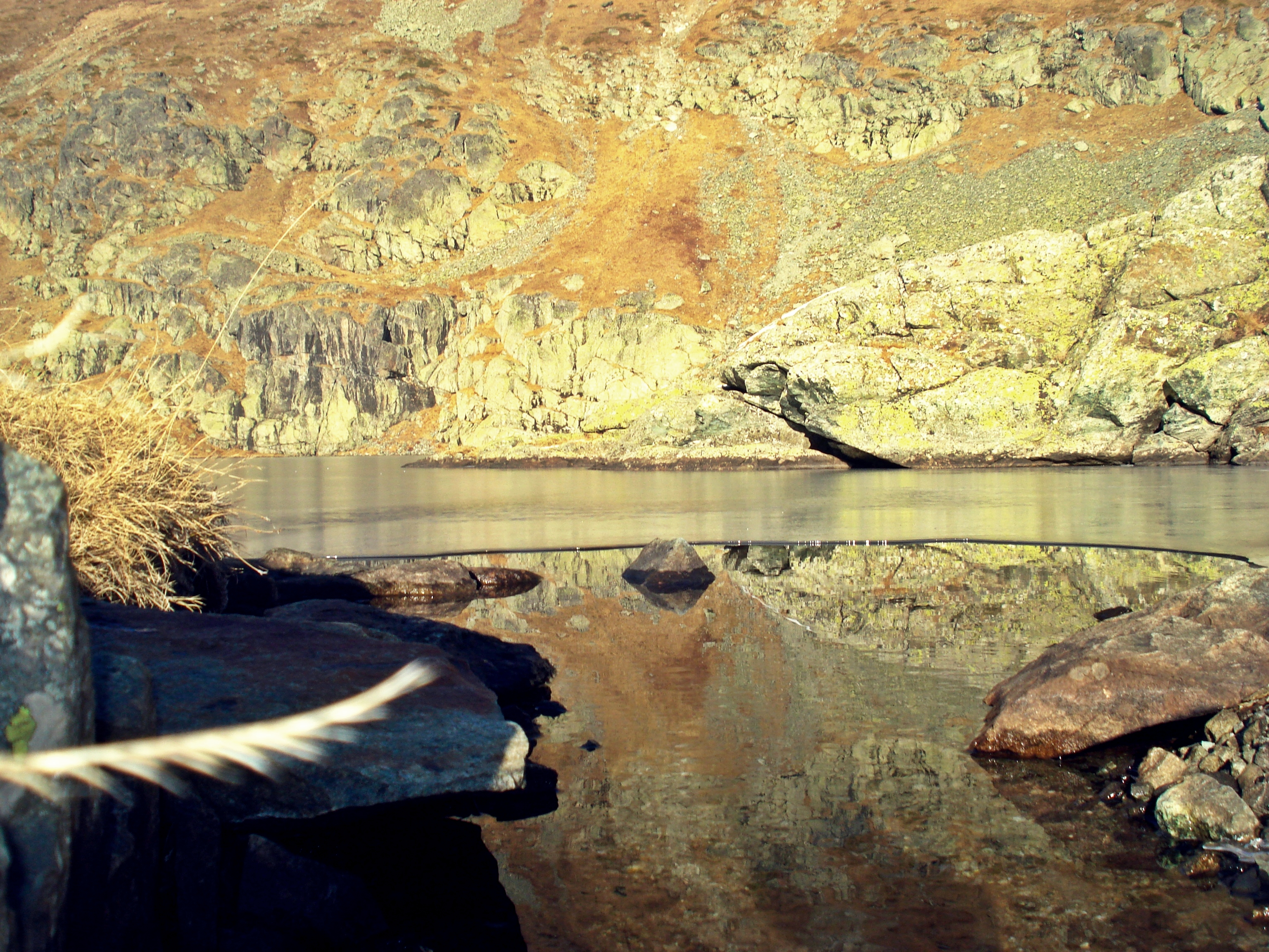 Këtu shihet vendi ku buron Lumi Erenik, Gjeravicë